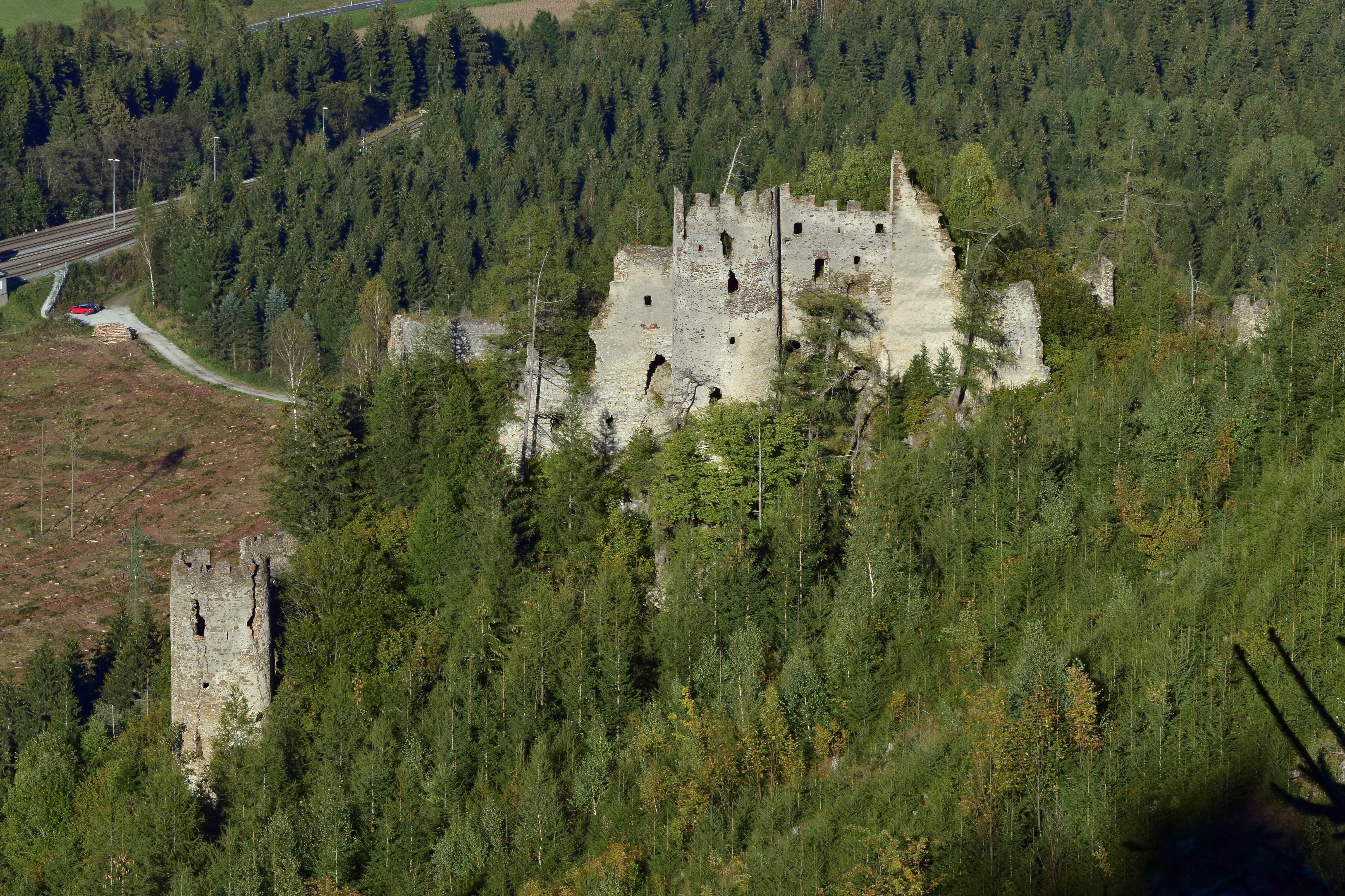 Beschreibung wird nachgeliefert